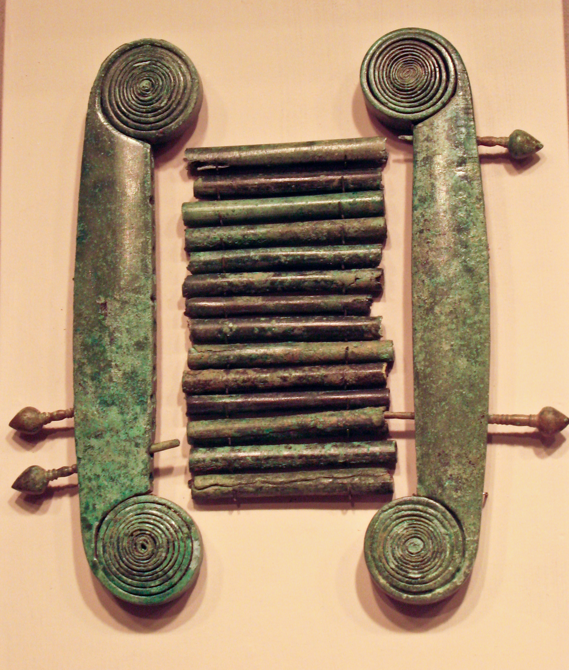 Bronze Musical Instrument